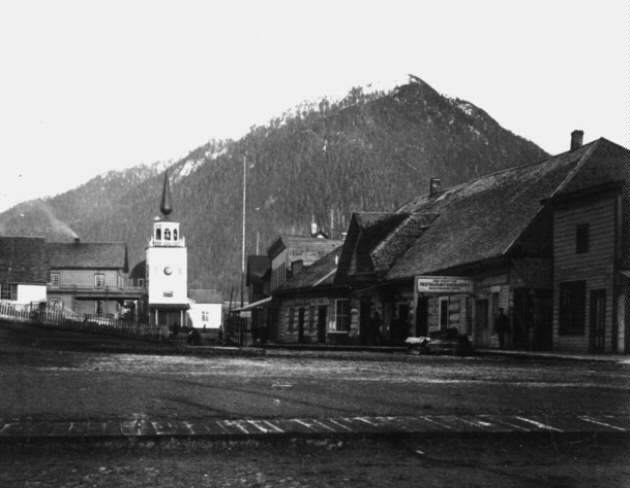 A sitkai (akkor Novoarhangelszk) Szent Mihály-székesegyház 1895 körül (Alaszka, USA)